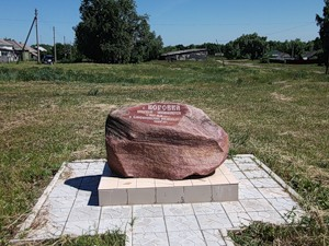 фотография памятного знака (камень) в честь юбилея села Коровка